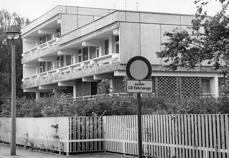 Berlin-Pankow, Irakische Botschaft ADN-Hubert Link -17.9.90 Berlin: In der irakischen Botschaft, Tschaikowskistraße 51, in der Nähe des Pankower Bürgerparks, lagern nach Bestätigung durch Sicherheitskräfte, größere Mengen Waffen und Sprengstoff. Kommandos, die im Begriff sind, sich zu formieren, sollen damit möglicherweise auf deutsche Entscheidungen "reagieren", die sich in irgendeiner Weise gegen den kriegführenden Irak richten.